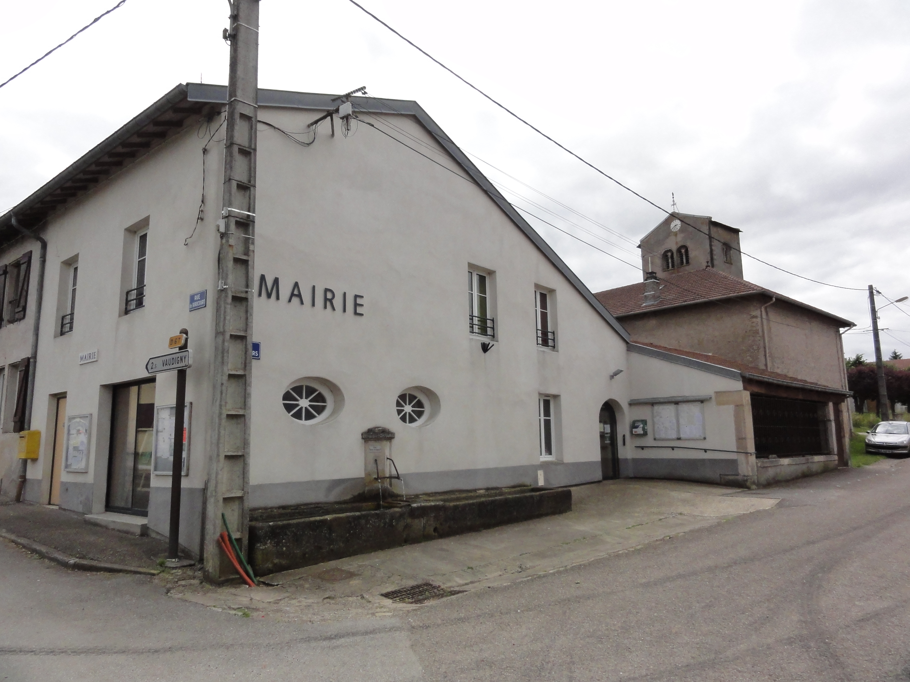 Vaudeville (M-et-M) mairie